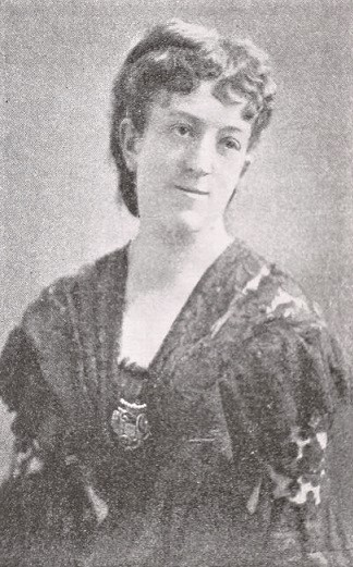 Ines Castellani Fantoni Benaglio